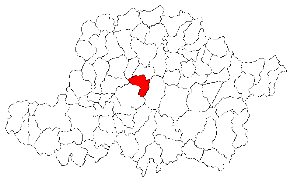 Categorie:Hărţi ale judeţului Arad